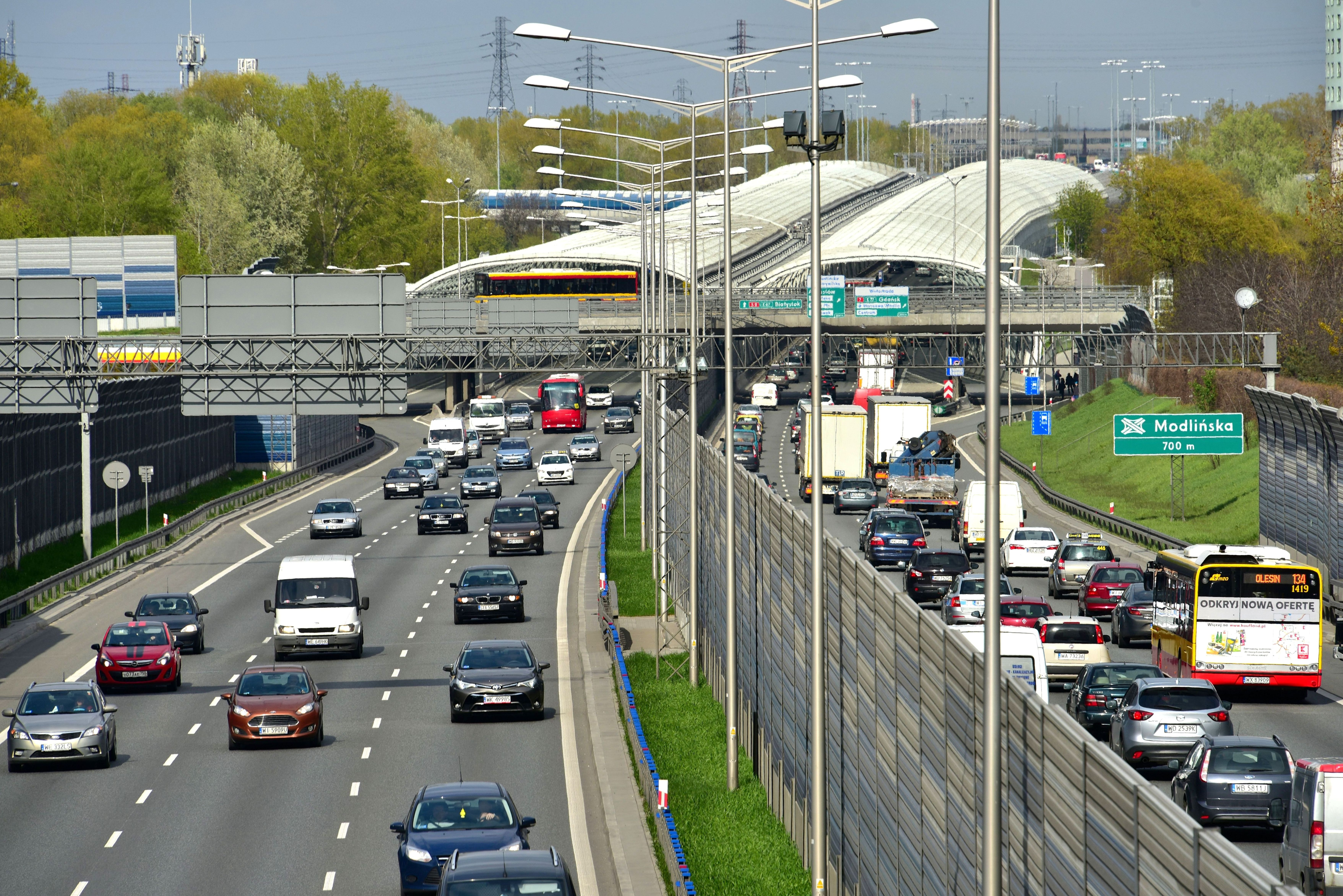 Aleja Armii Krajowej w Warszawie widok z ul. Kolektorskiej w kierunku wschodnim